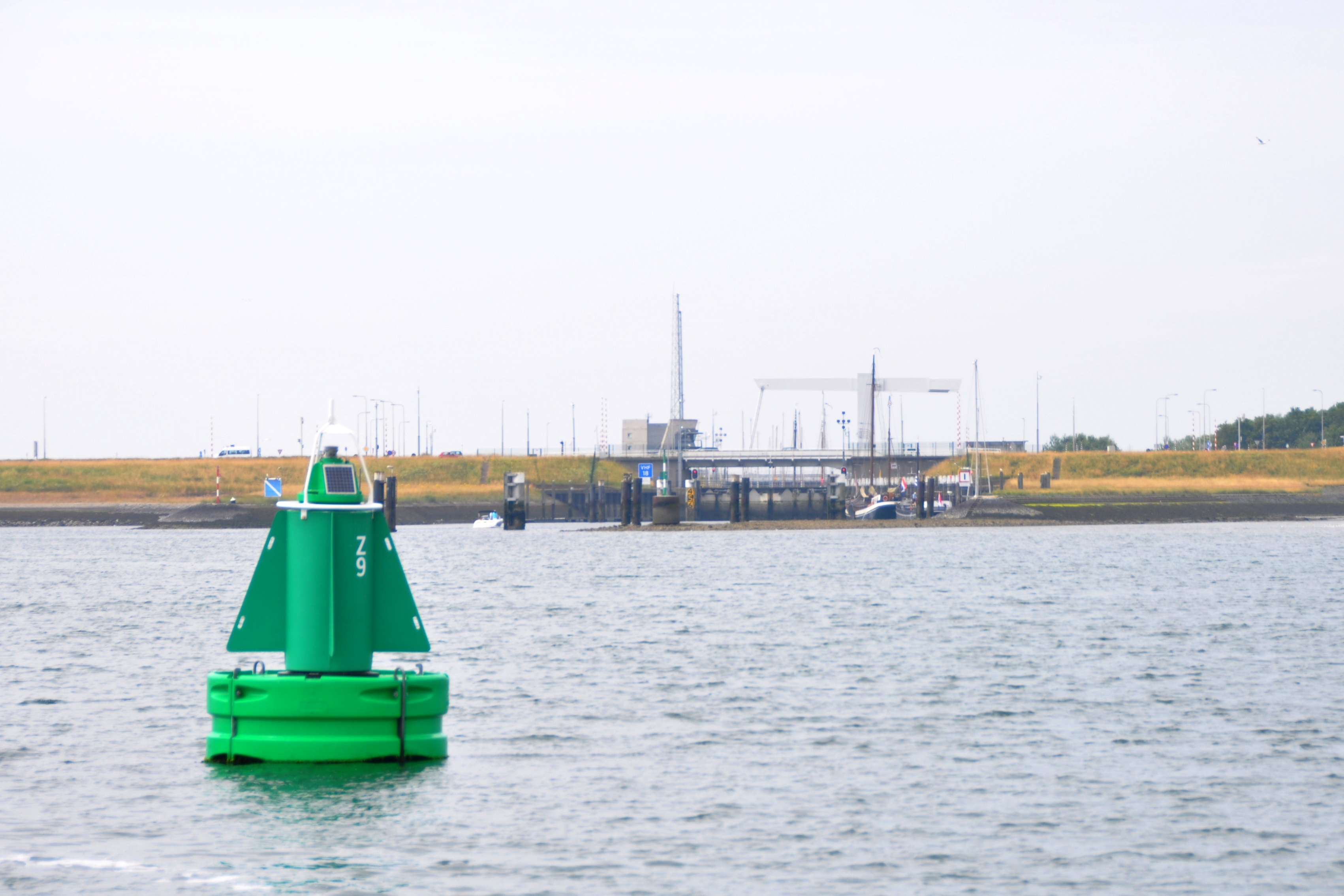 De Z9 in de Zandkreek.